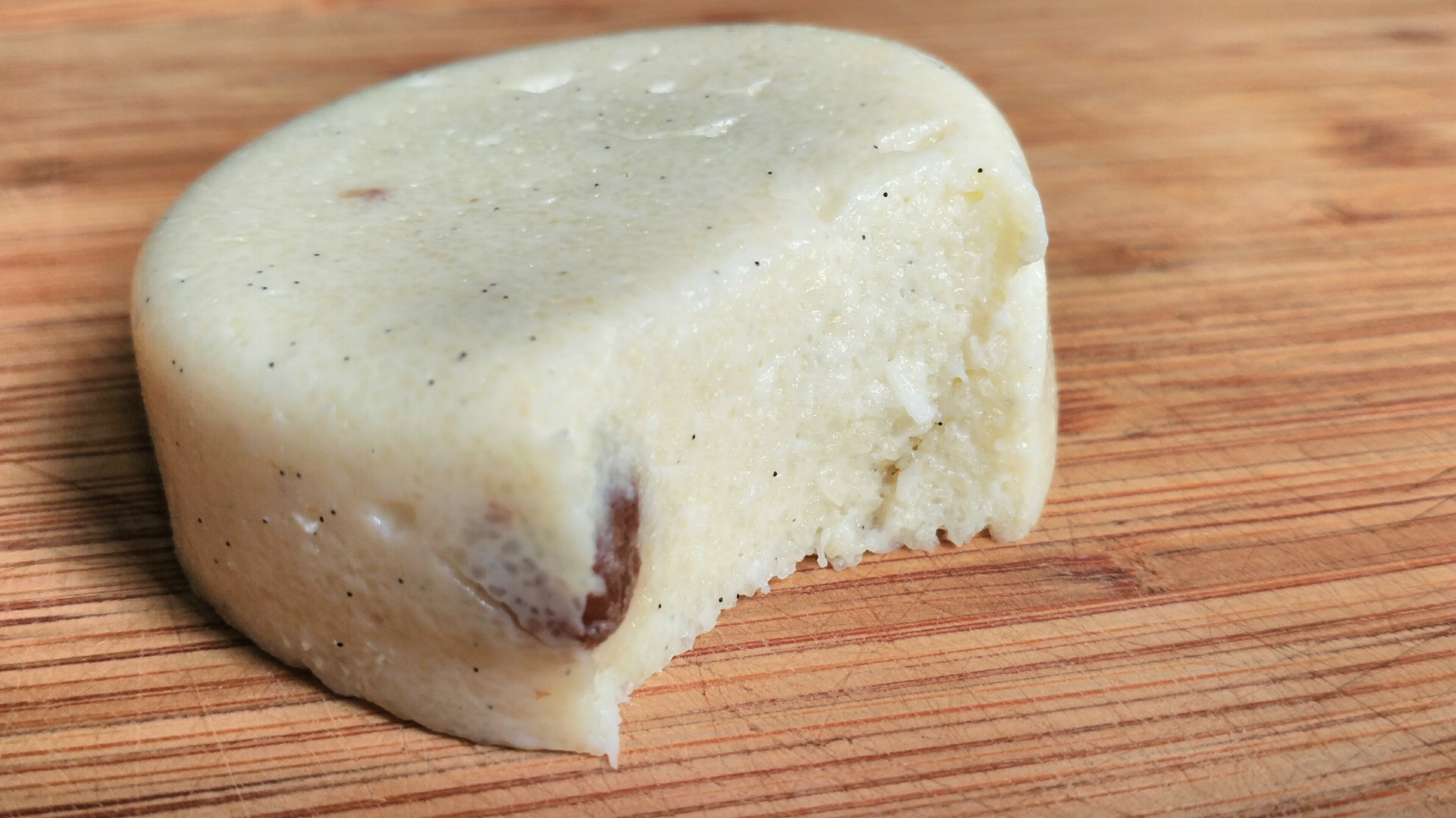 gâteau de semoule à la vanille et aux raisins